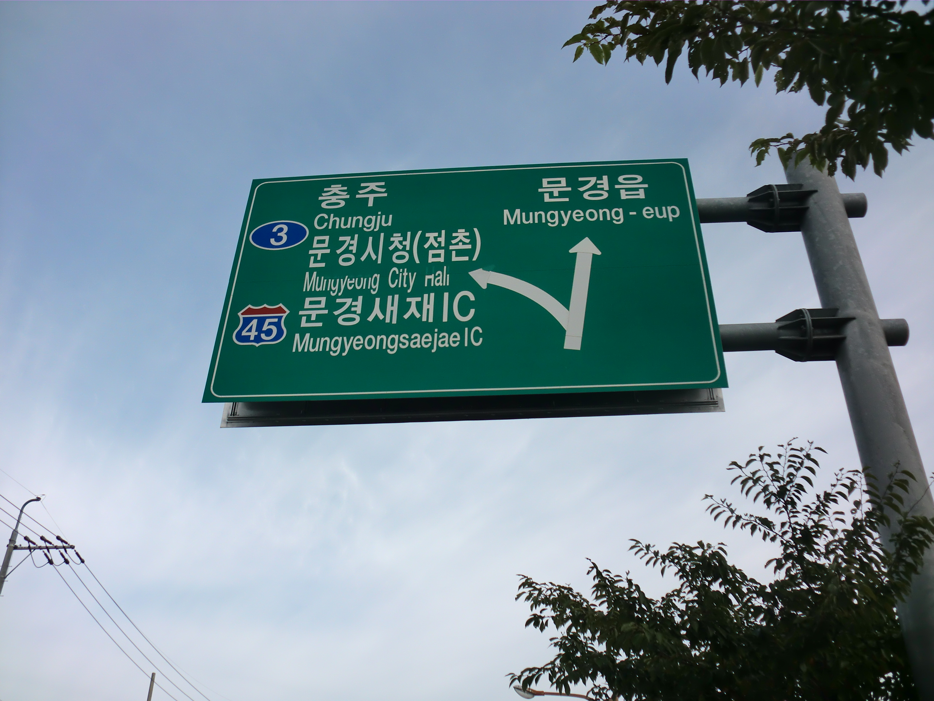 문경시청과 문경읍을 구별하고 사용있는 도로안내표시(문경읍에서 촬영)